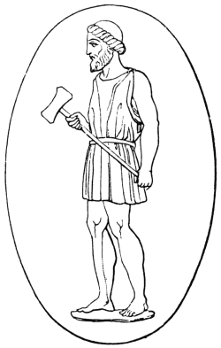 Greek God Hephaistos